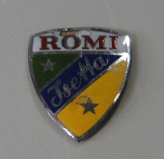 museu de bebedouro 06-09-2010 12-36